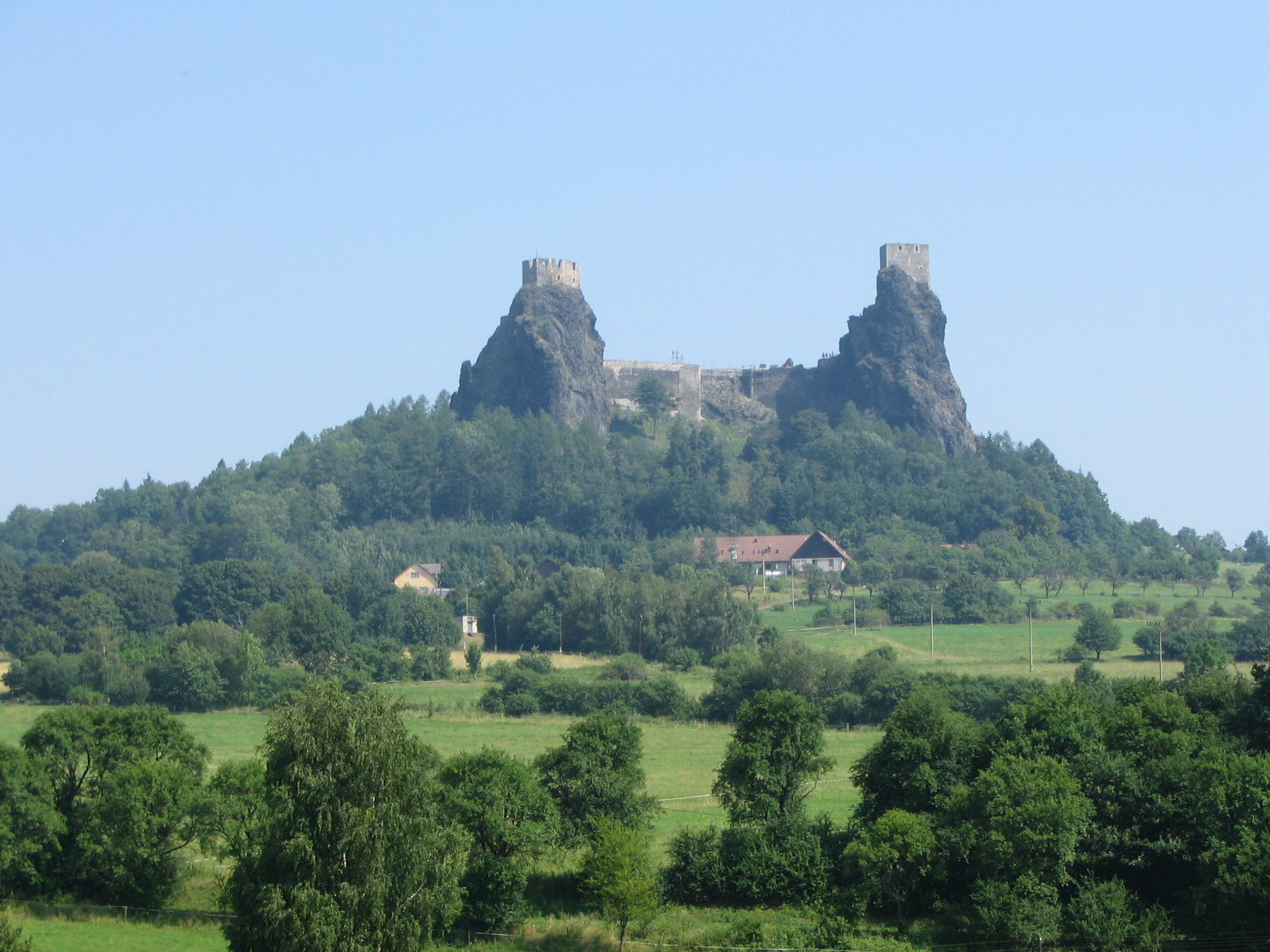 Hrad Trosky, zřícenina